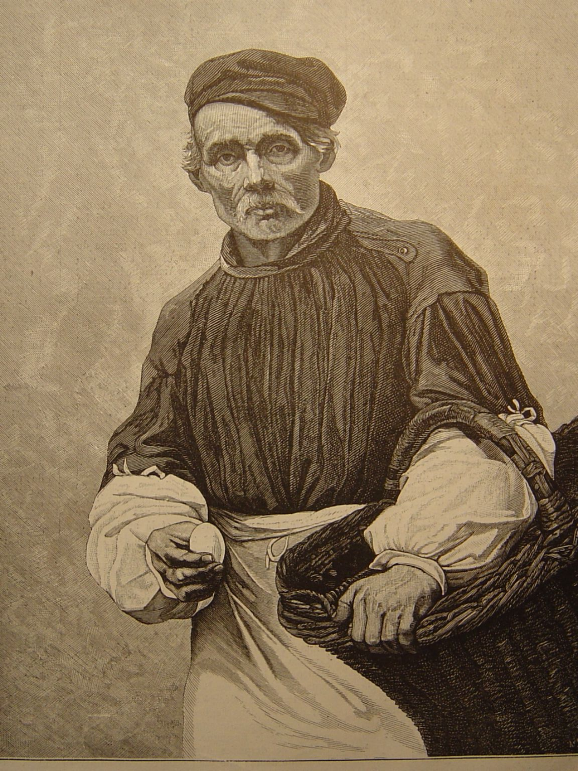 Parmi les nombreux représentents de ces petites industries ambulantes le marchand d'oeufs est une des figures les plus sympathiques . Toujours bien propret , un tablier blanc. Il a su gagner les bonnes grâces de tous